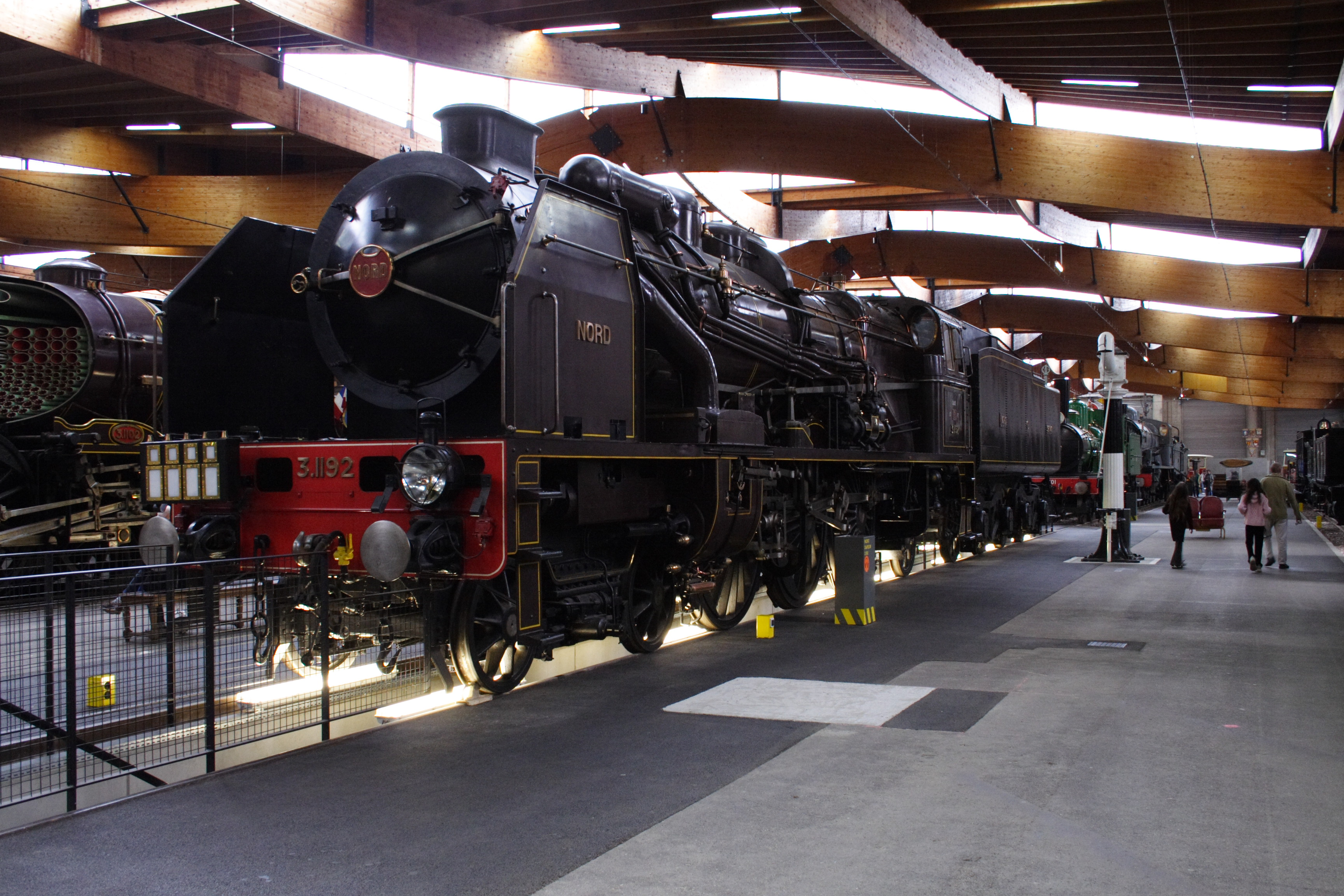 a steam locomotive 3.1192 at the Cité du Train de Mulhouse(Mulhouse, France)